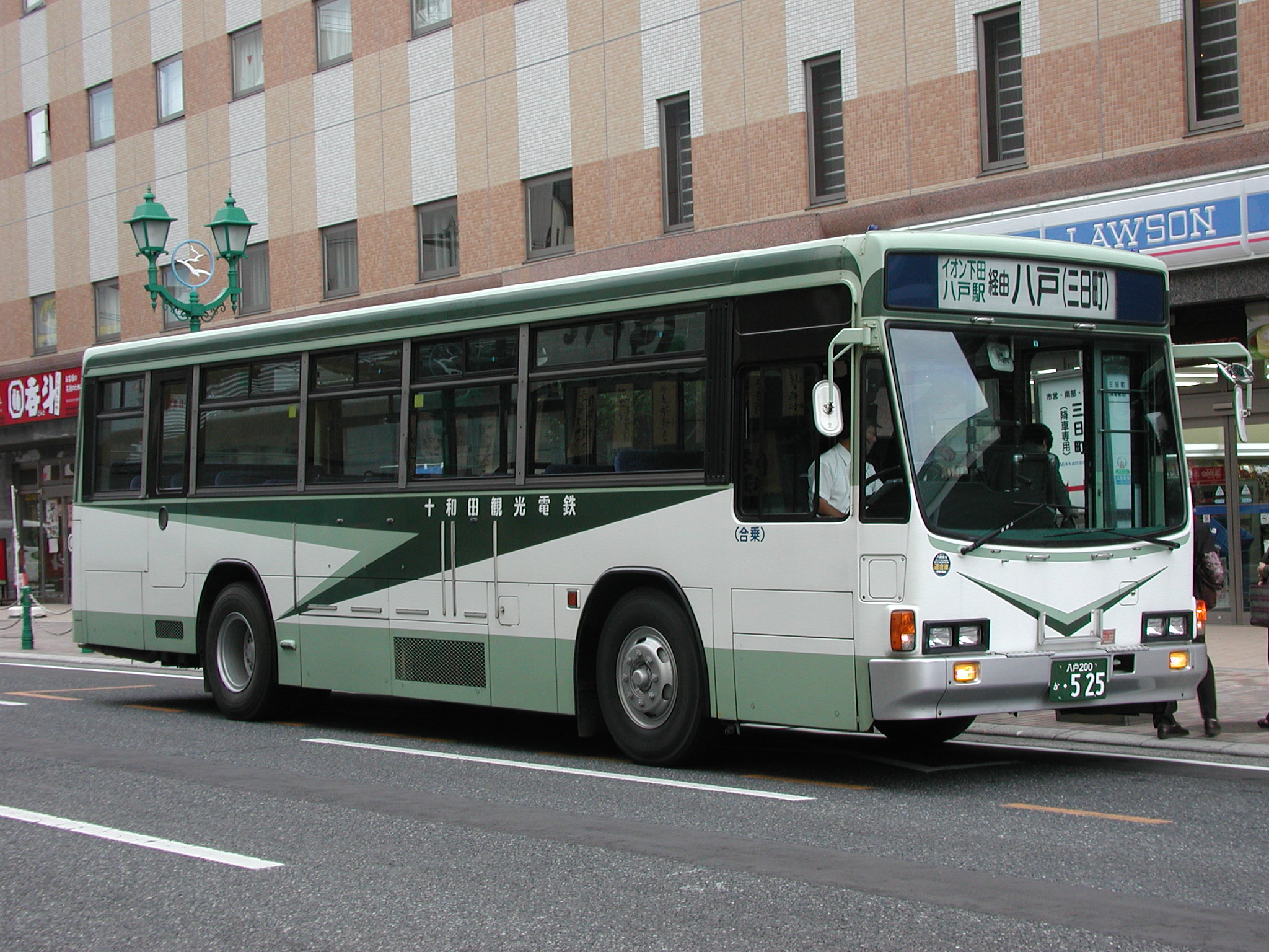 十和田観光電鉄 いすゞ・キュービック(U-LV324L/元：国際興業)